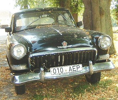 Wolga (russische Automarke) Baujahr 1956